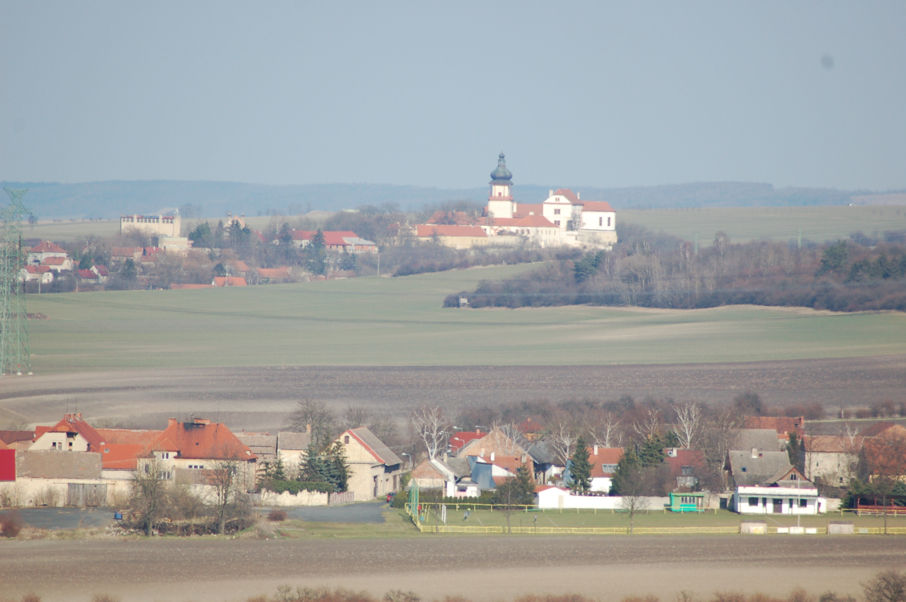 V pozadí Jimlín, v popředí Lipenec - pohled ze západojihozápadu (od Lipna)